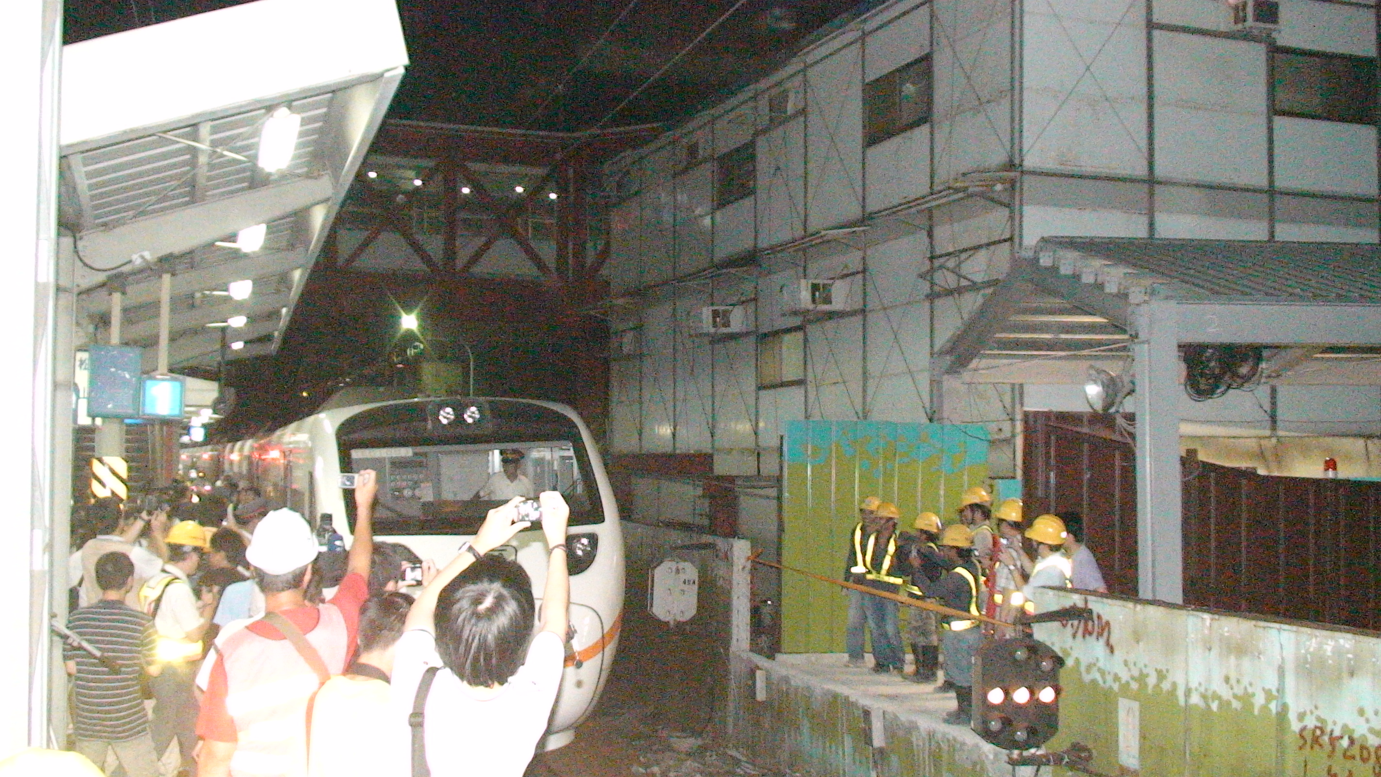 中文（台灣）: 歡送台北市區地面最後一班火車暨平交道消滅，該班次是2008年9月20日的第1074車次太魯閣號。照片右邊待命的是臨時通道工程隊，臨時通道工程隊下方的號誌機是三位式調車號誌機。